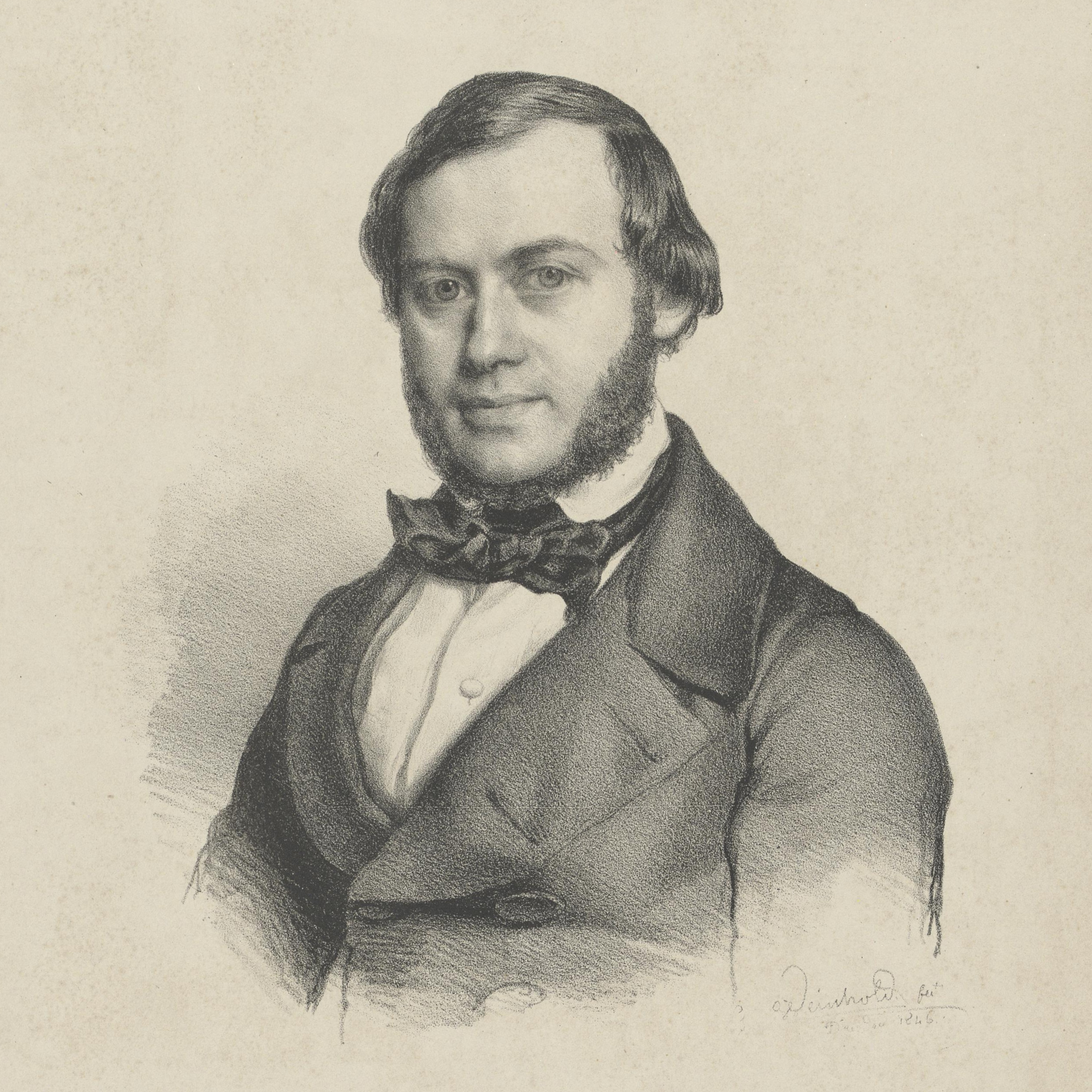 Ferdinand David (* 20. Januar 1810; † 19. Juli 1873)